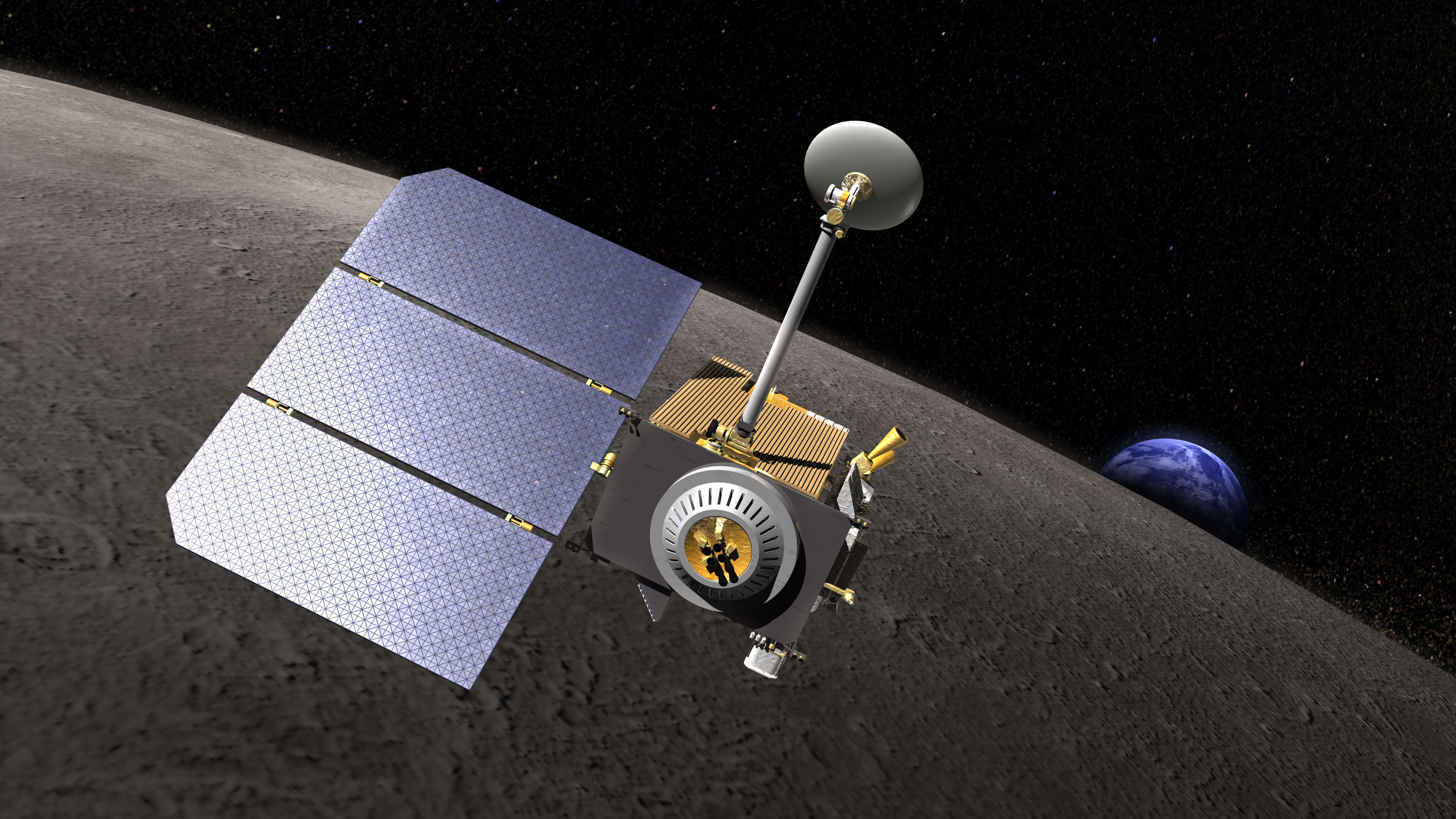 Lunar Reconnaissance Orbiter (configuration: 2007)